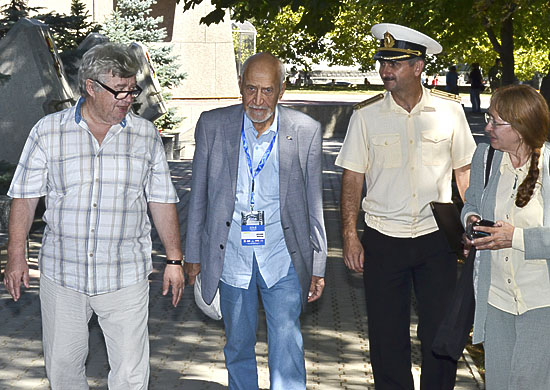 Председатель Союза журналистов России Всеволод Богданов и Николай Дроздов на XII Международном кинофоруме «Вместе» в Севастополе